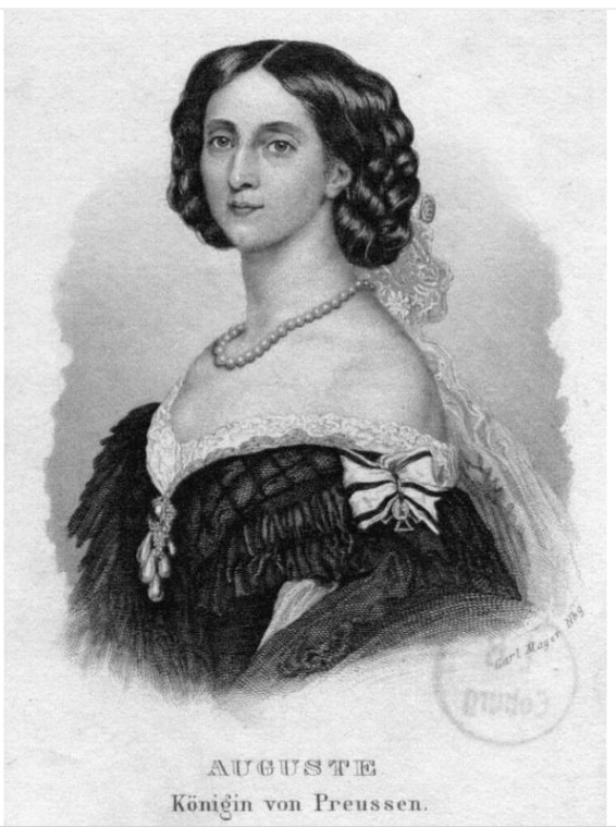 Augusta von Sachsen-Weimar-Eisenach